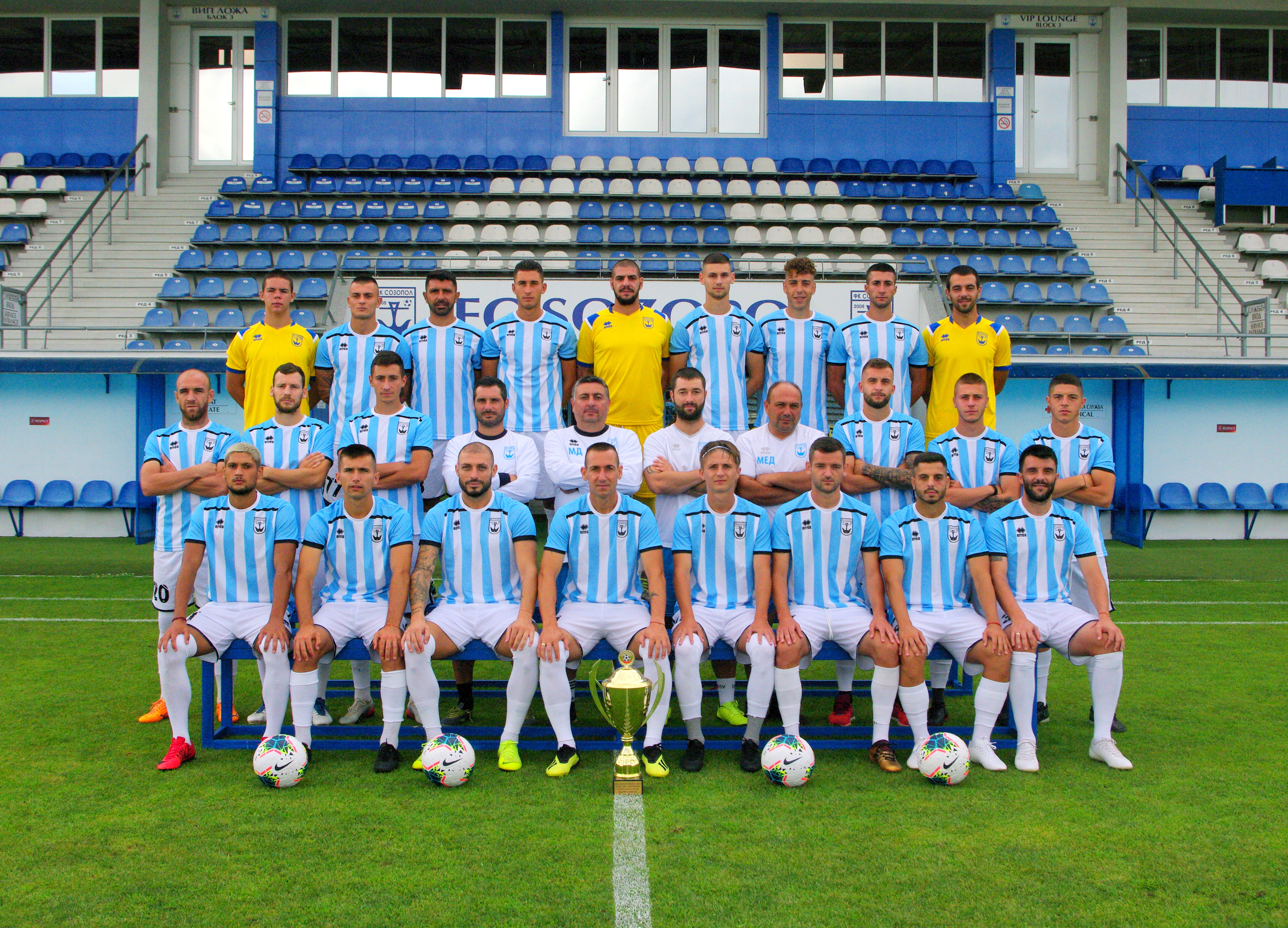 Созопол сезон 2020-2001